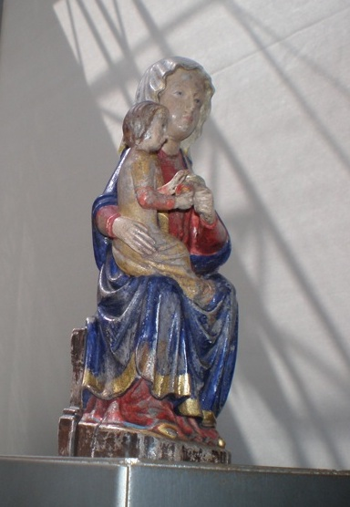 Magna Mater Austriae - Kopie der Mariazeller Gnadenmuttergottes